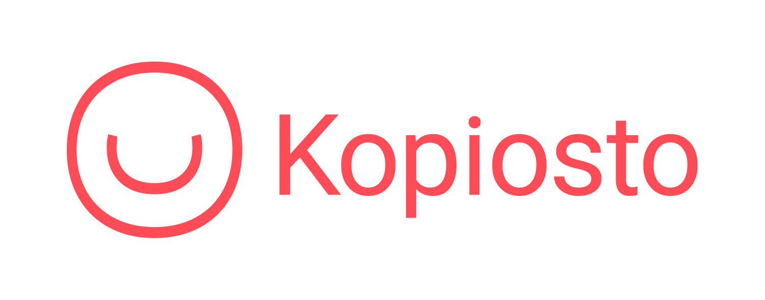 Kopioston logo uudistui vuonna 2018. Logo koostuu (c)-merkkiä varioivasta symbolista ja Kopiosto-tekstistä. Tunnuksen on suunnitellut Jenni Kuokka / Hahmo Design.